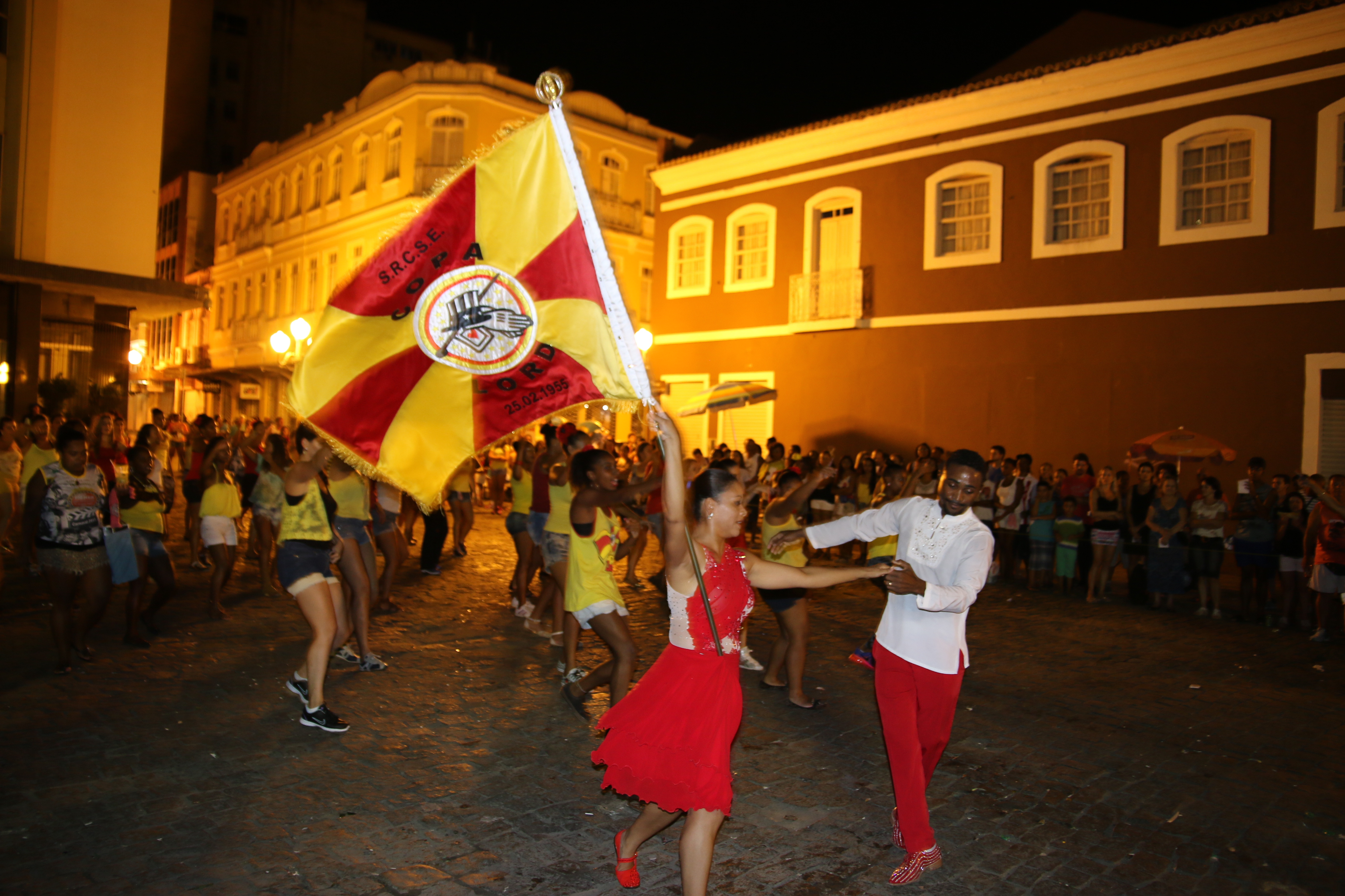 S.C.R.S. Embaixada Copa Lord fazendo um ensaio no Centro em 2015.